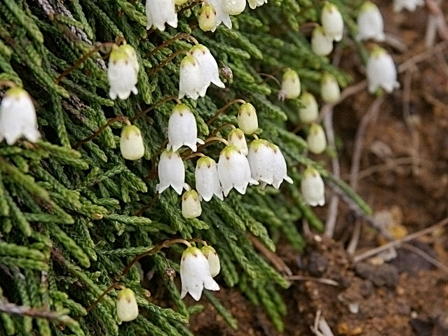 イワヒゲ (北海道富良野岳) Cassiope lycopodioides (Mt.Furano, Hokkaido, Japan)